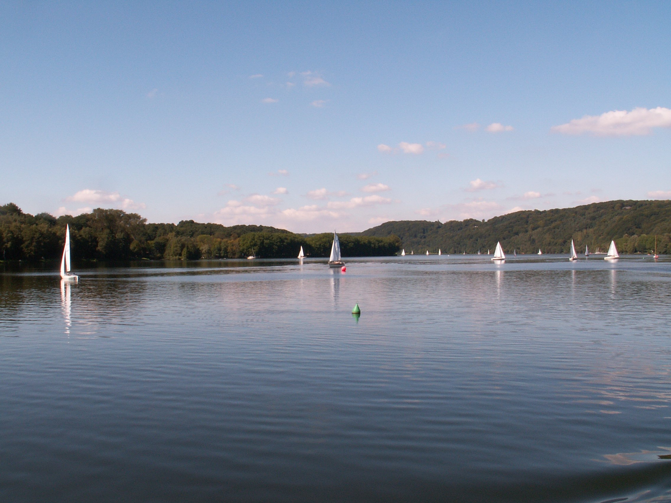 Segler auf dem Baldeneysee. Blick von Heisingen in Richtung Stauwehr in Werden.